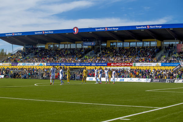 SNN-tribunen